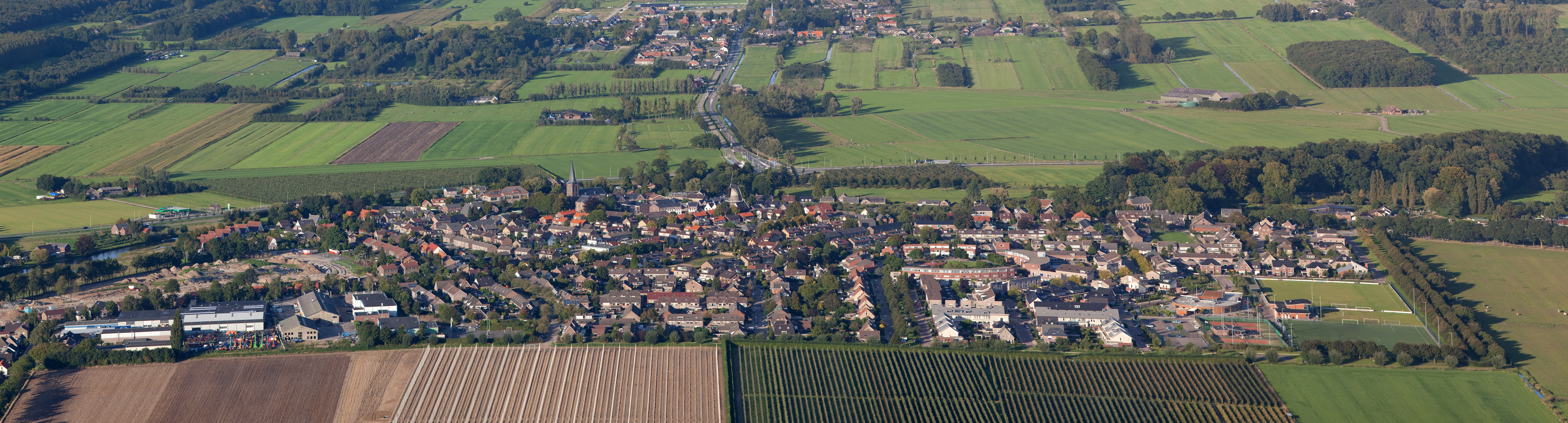 Cothen is een dorp in de Nederlandse provincie Utrecht. Tot 1996 was een zelfstandige gemeente; in dat jaar werd het samengevoegd met Wijk bij Duurstede en Langbroek tot de gemeente Wijk bij Duurstede.